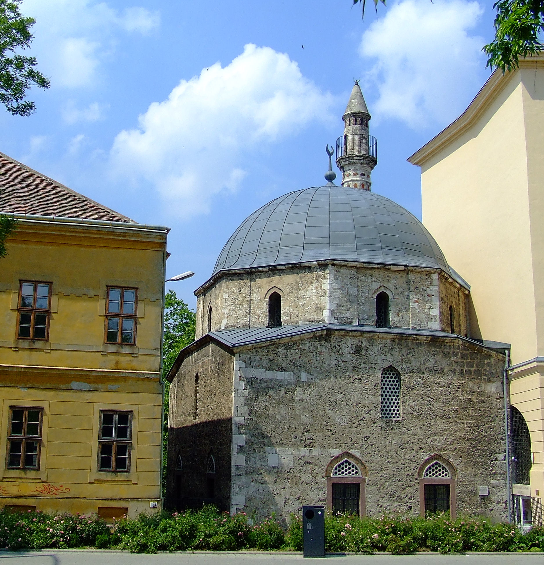 Jakováli Hasszán dzsámija Pécsen